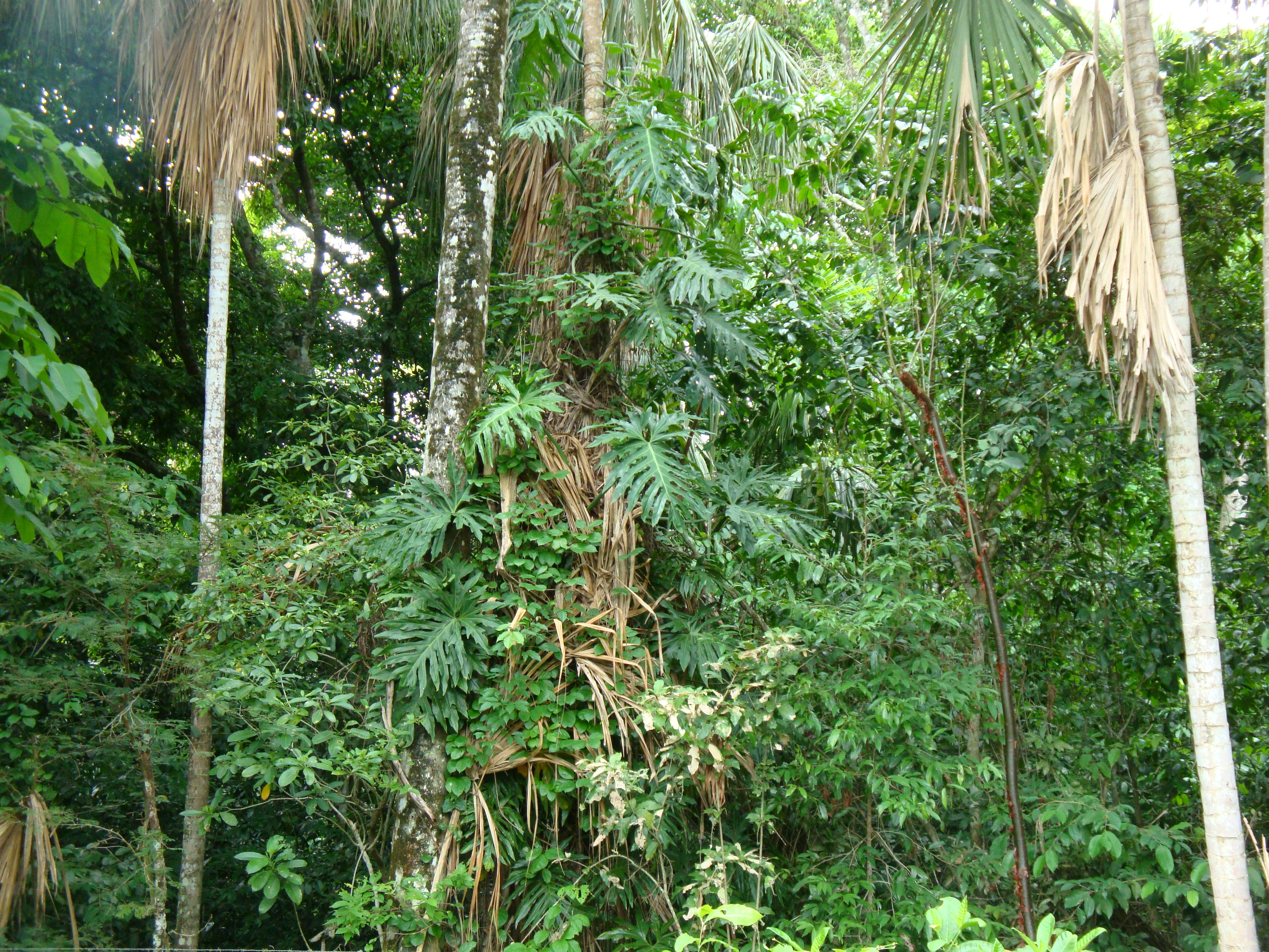 Selva tropical lluviosa, en el estado de Tabasco, México.